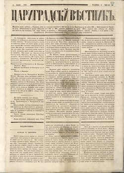 Заглавна част на Цариградски вестник